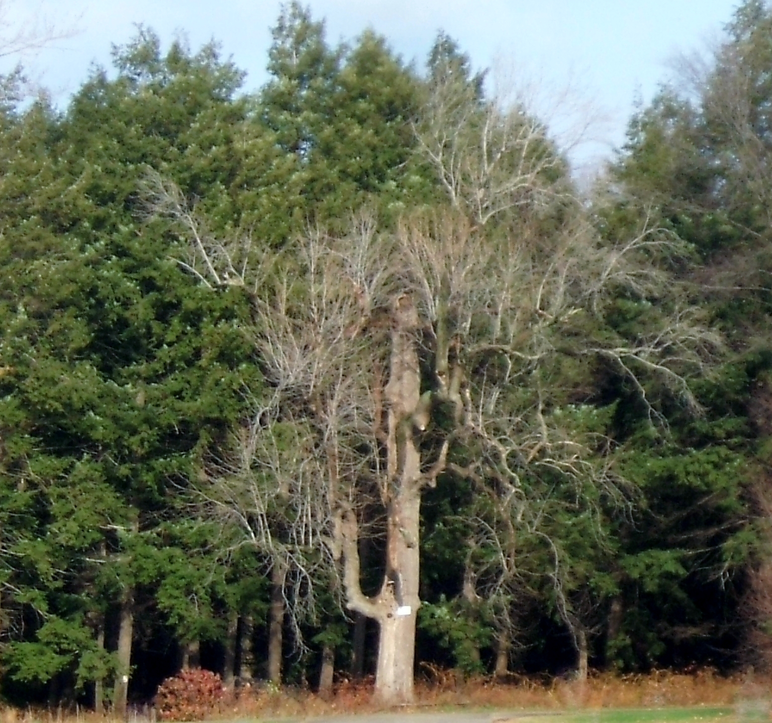 Magnolia Tree